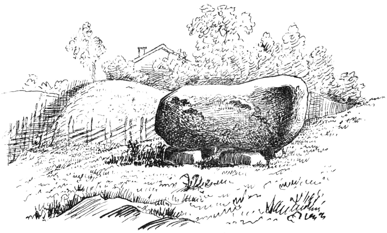 "Domaresten" i Borgs socken, Östergötland. Troligen RAÄ-nummer Borg 218:1. Teckning i "Utdrag af Antiqvitets-Intendenten P. A. Säves afgifna berättelse för år 1861", publicerad i Antiqvarisk tidskrift för Sverige band 1, 1864.